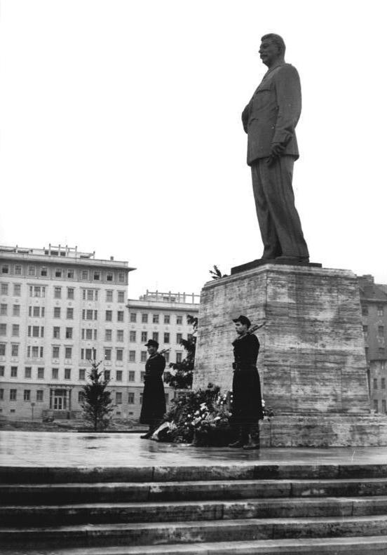 ADN-ZB-Weiß-6.3.1953 Die Berliner ehren J.W.Stalin.Am frühen Morgen des 6.3.1953, nach dem Bekanntwerden der Nachricht vom Tode des großen Stalin, begaben sich zahlreiche Berliner zum Stalin-Denkmal in die erste sozialistische Straße Berlins und legten dort Blumen nieder.